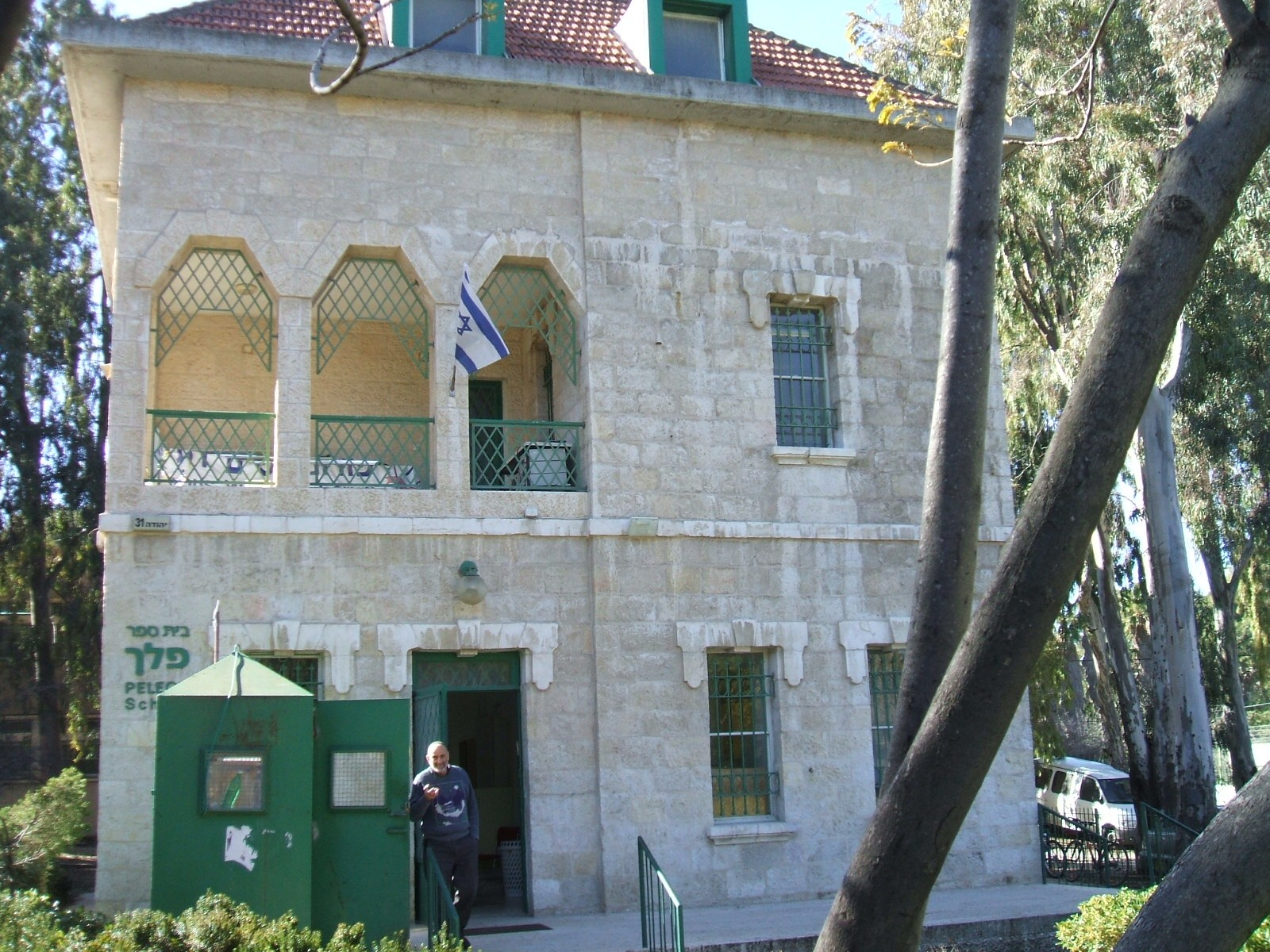 "Pelech" School in Jerusalem